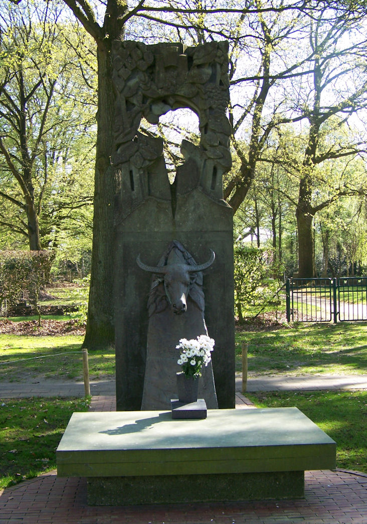 Indiëmonument in Emmen (1993), door Onno de Ruijter